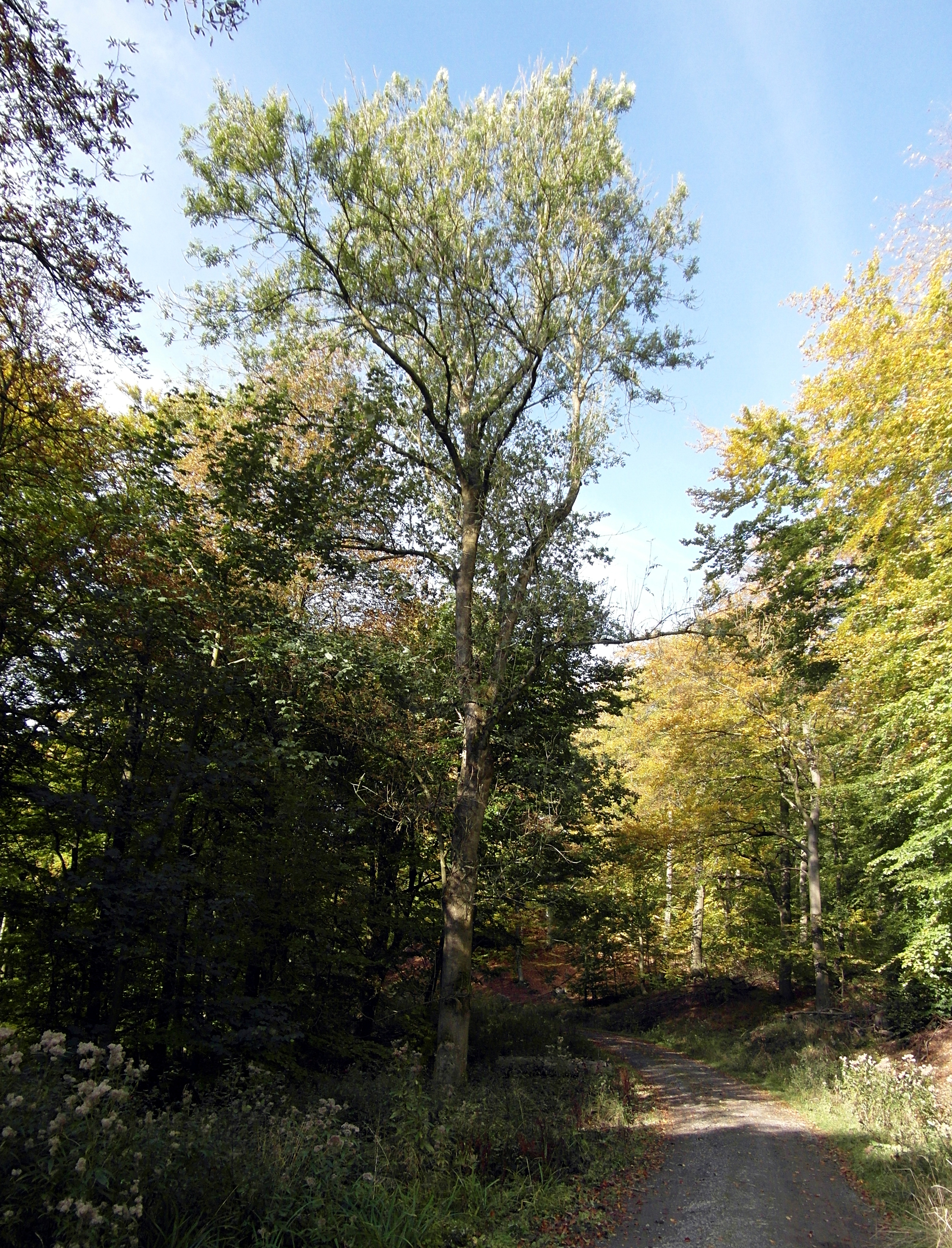 Der Wallmannsweg im Landschaftsschutzgebiet Süd-Deister (LSG HM 00031)